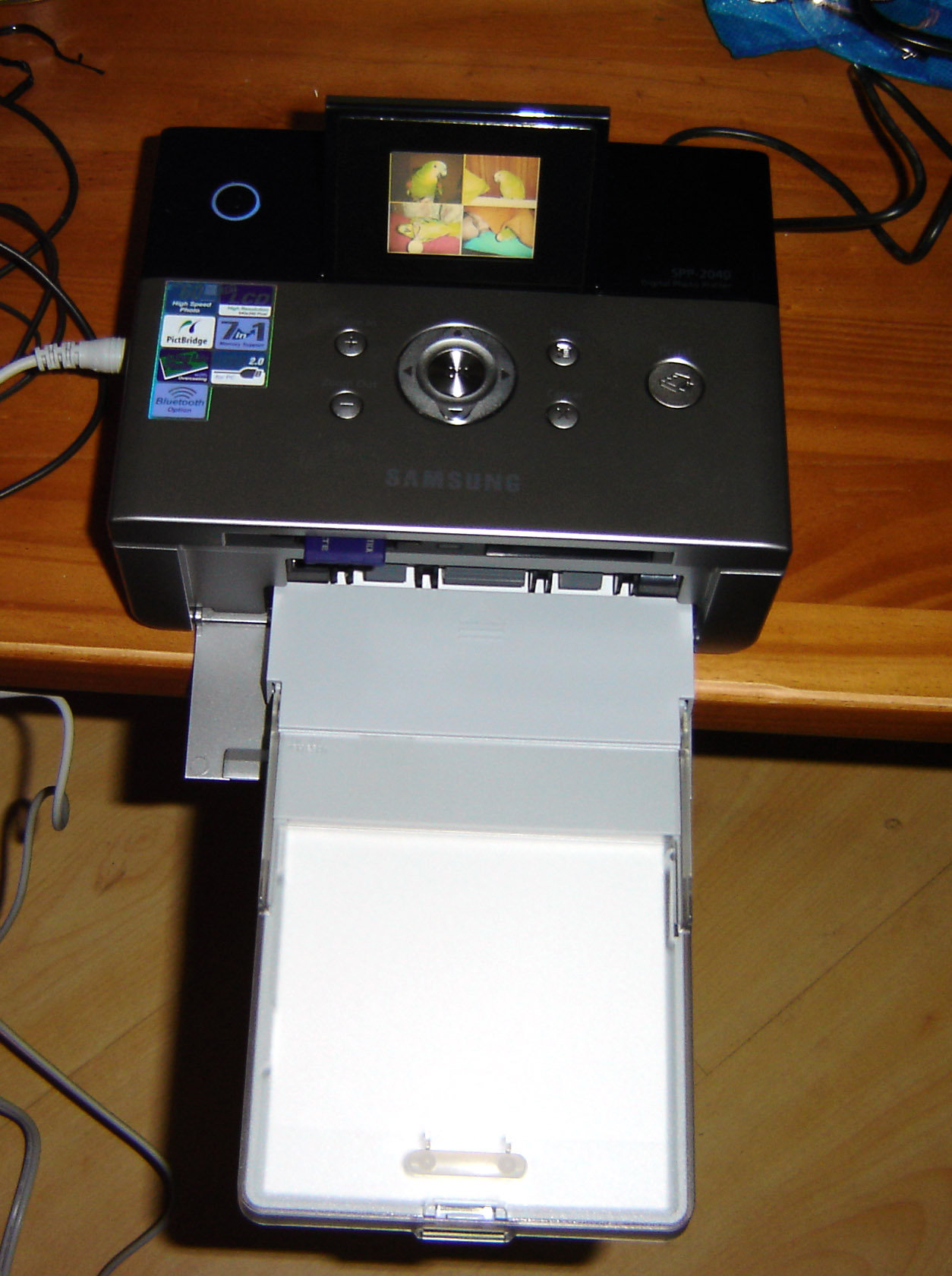 Samsung SPP-2040 dye-sublimation printer